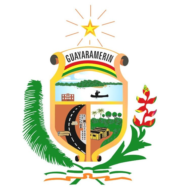 Escudo de la Ciudad de Guayaramerin